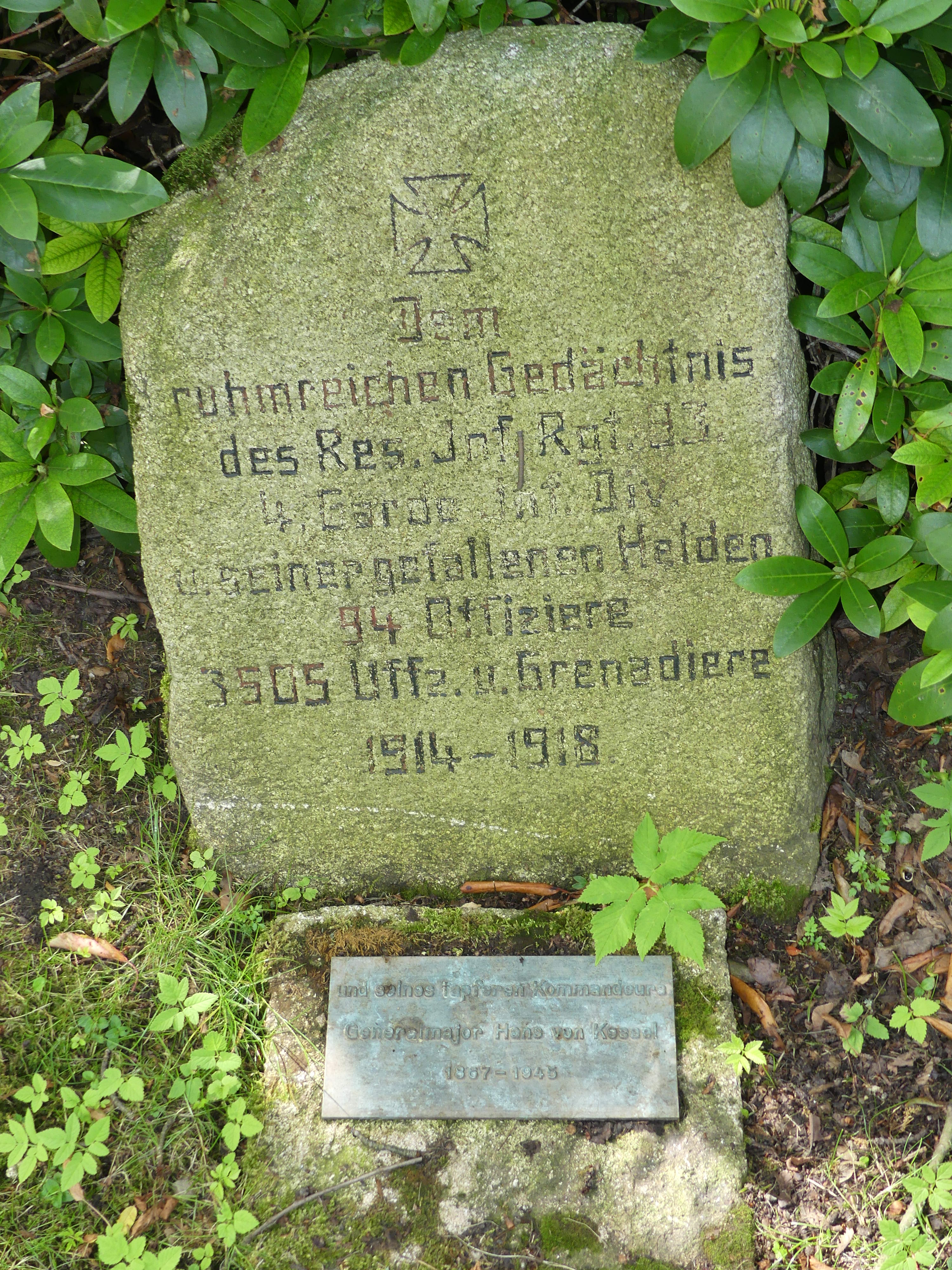 Gedenkstein für die Gefallenen des Reserve-Infanterie-Regiments Nr. 93 der 4. Garde-Division auf dem Alten Friedhof in Goslar